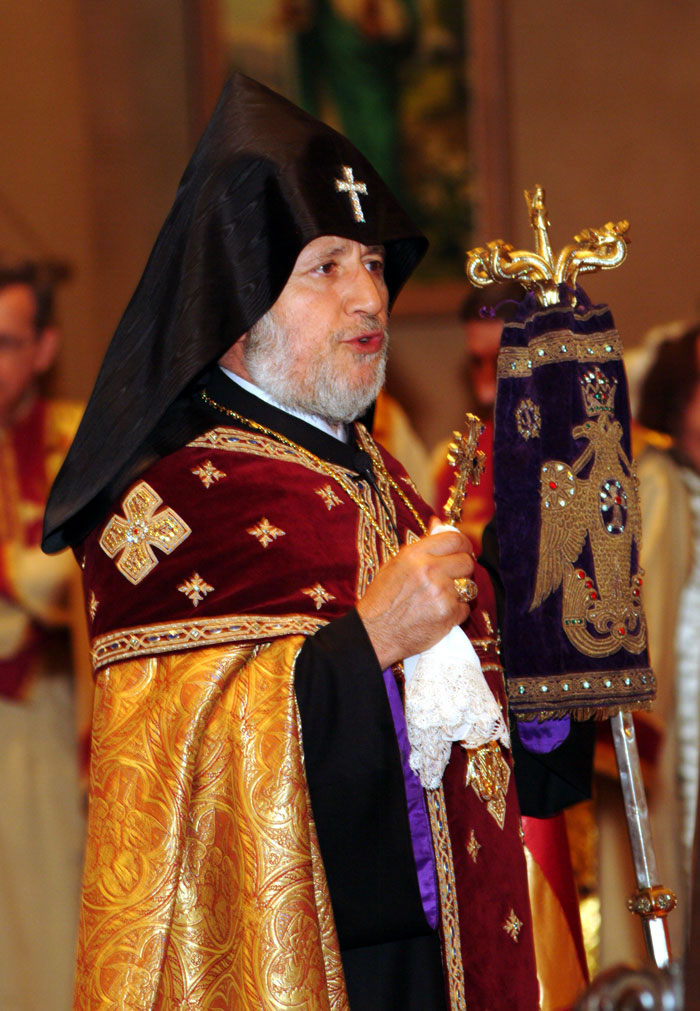 კათოლიკოსი გარეგინ II.